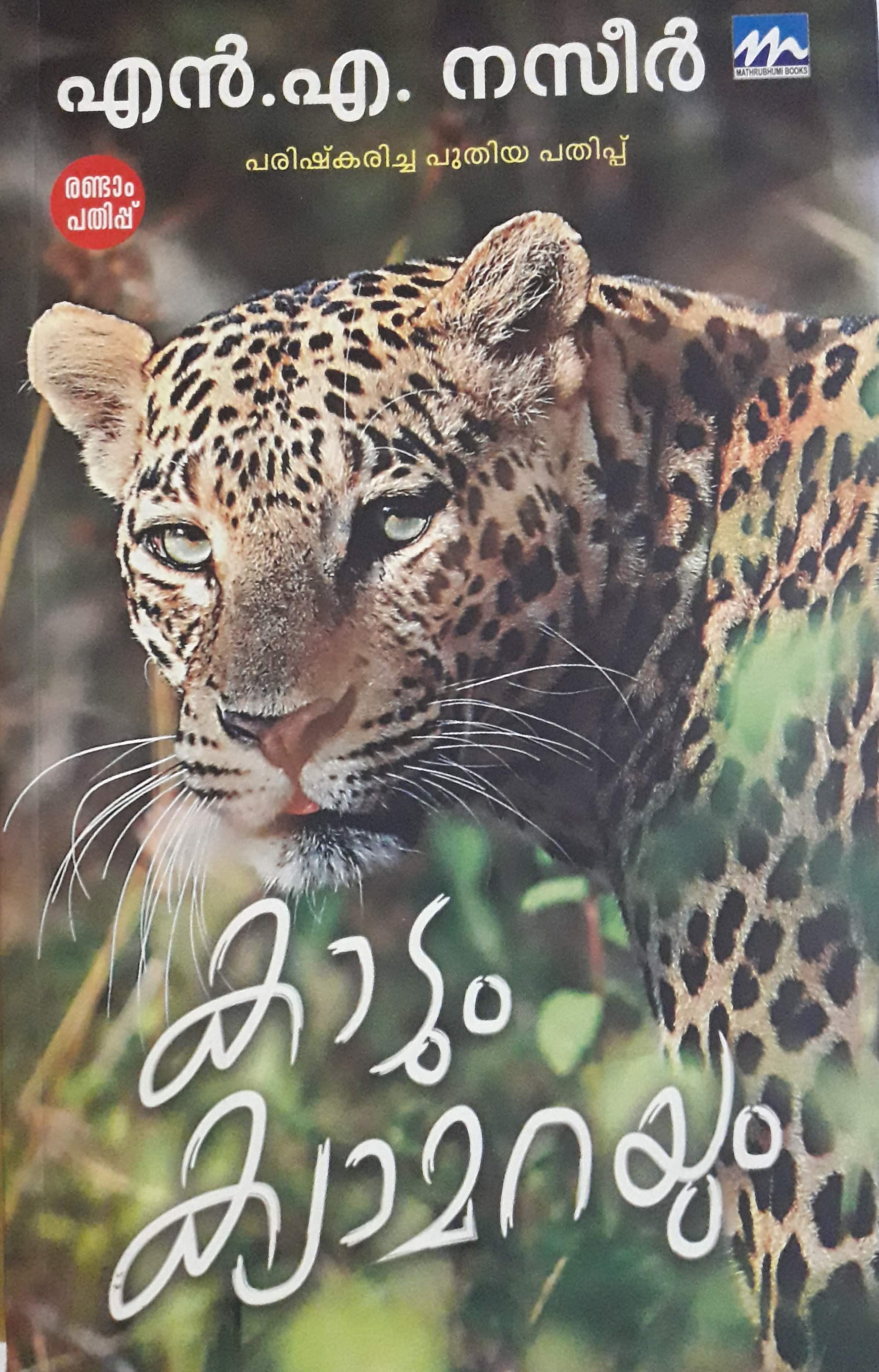 എൻ എ നസീറിന്റെ പുസ്തകമാണ് കാടും ക്യാമറയും